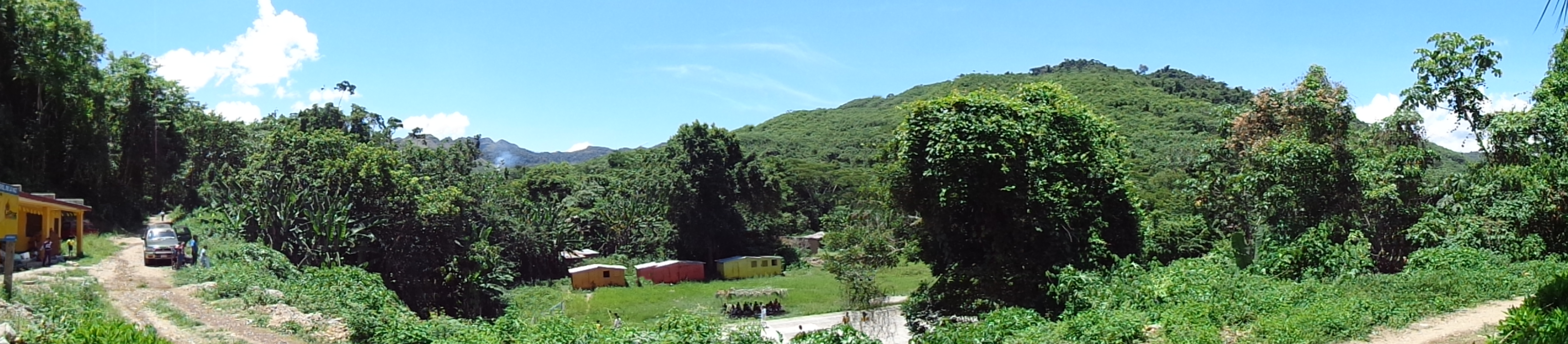 Vista panorámica de la comunidad de Yurumani en el macro distrito Zongo. Sector tropical del Municipio de La Paz